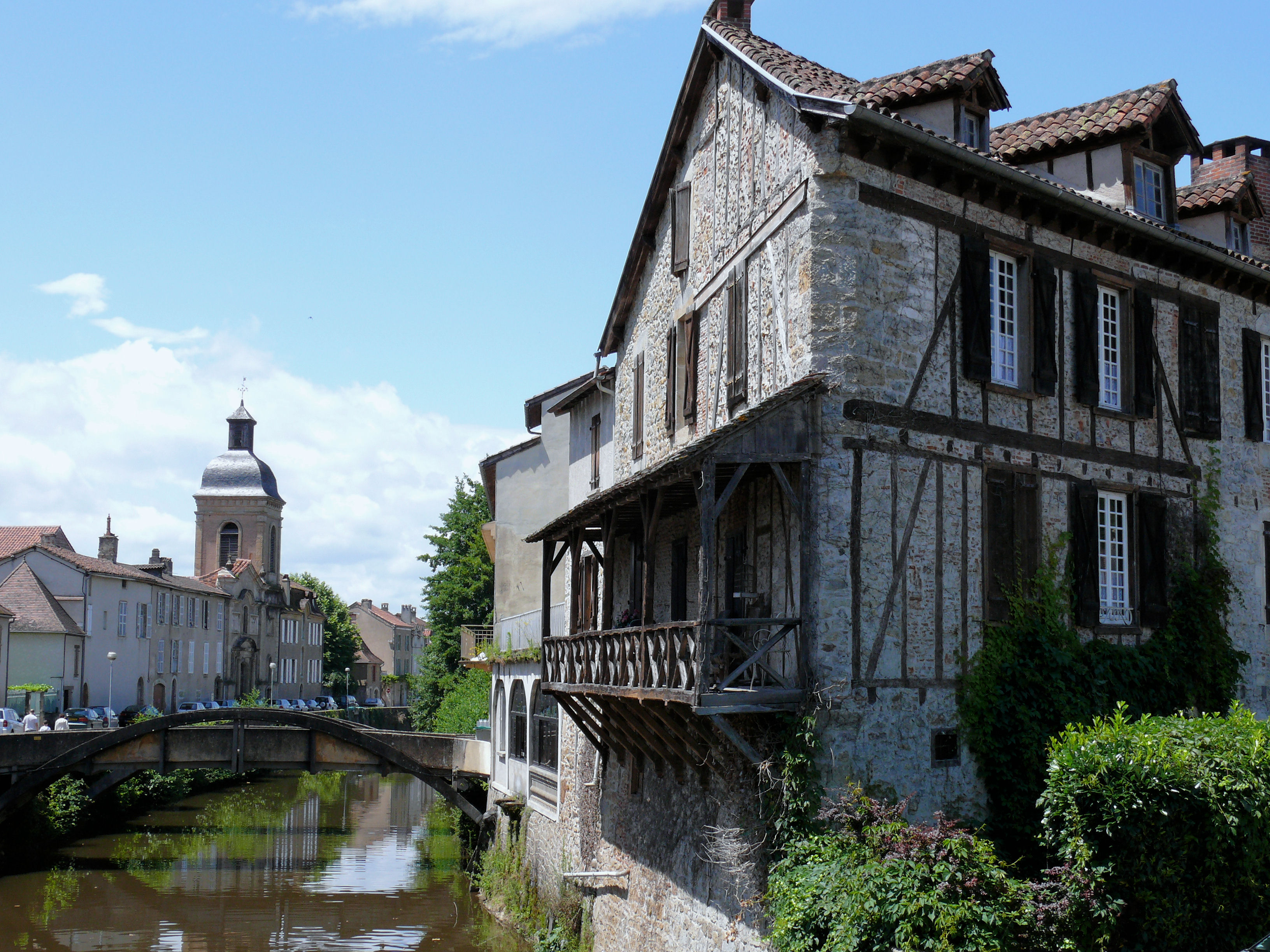 Saint-Céré - La Bave et le quai des Récollets